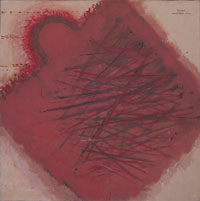 Hibrid (Hybrid), Öl auf Leinwand 700x700mm